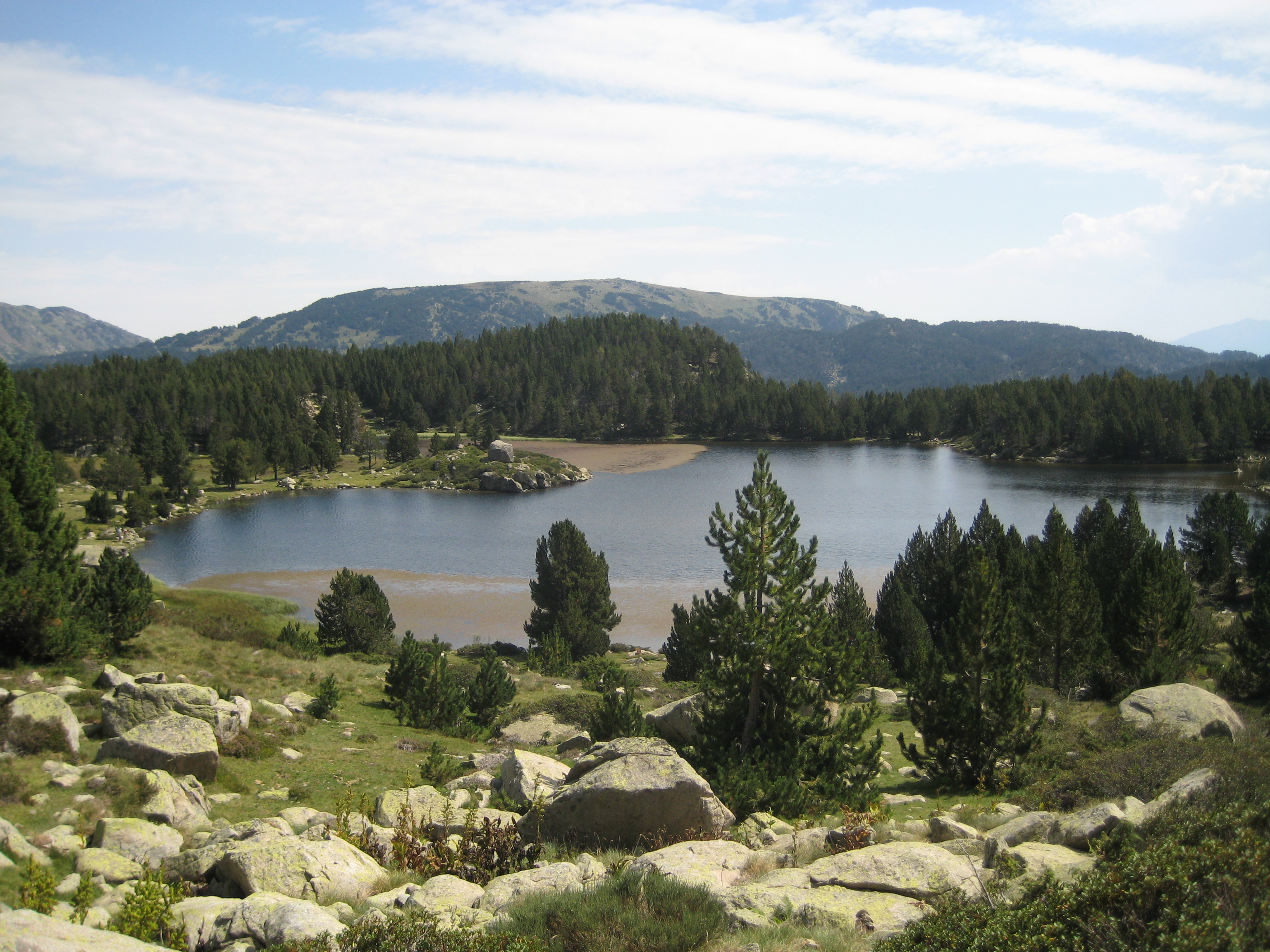 l'étang Vivé, un des étangs du Carlit